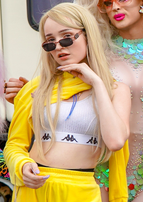 Kim Petras performs - Capital Pride concert 2018